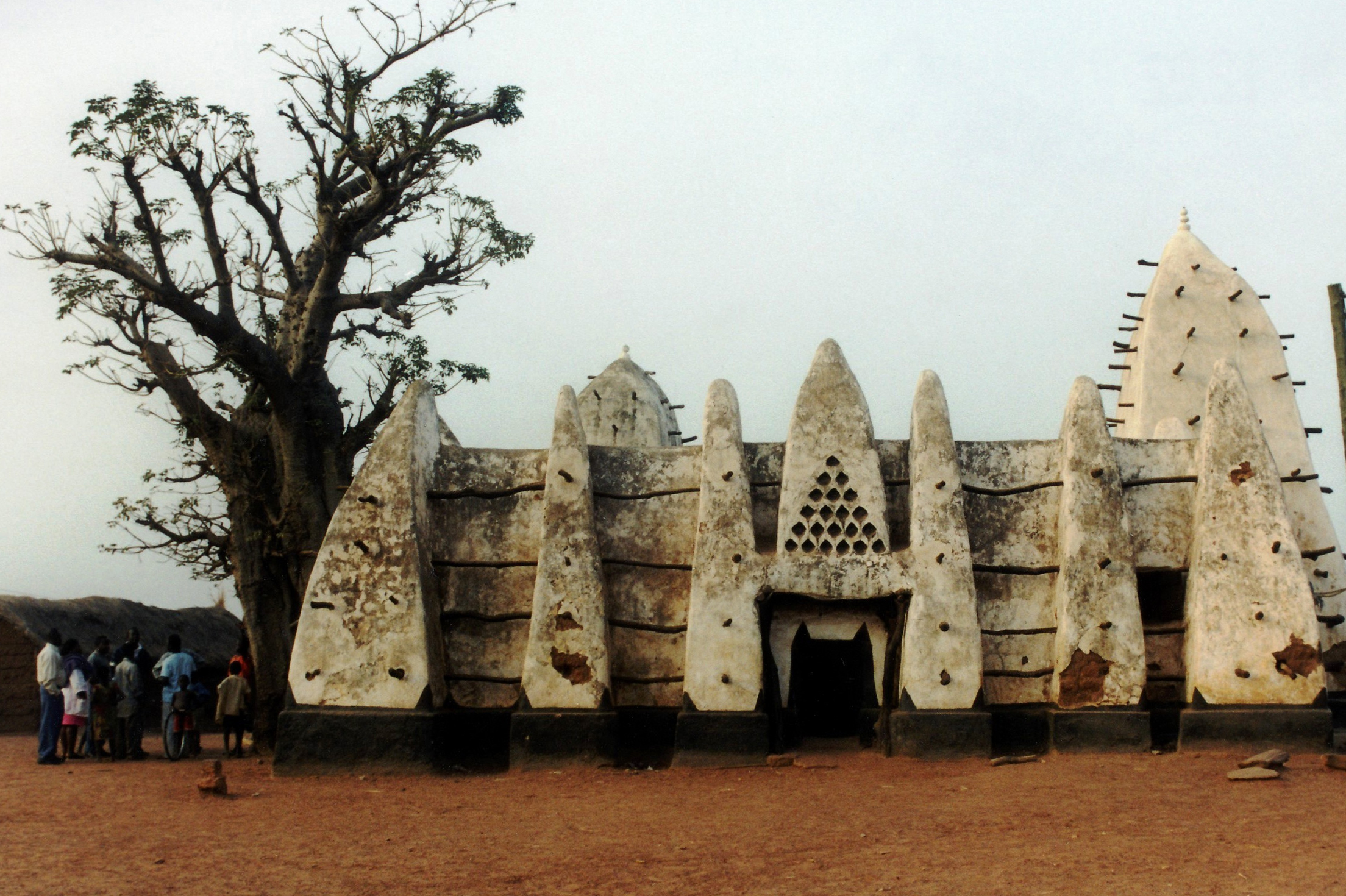 Muslimische Moschee in Larabanga - Vorderansicht; fotografiert von Joerg Scherbaum (2002).